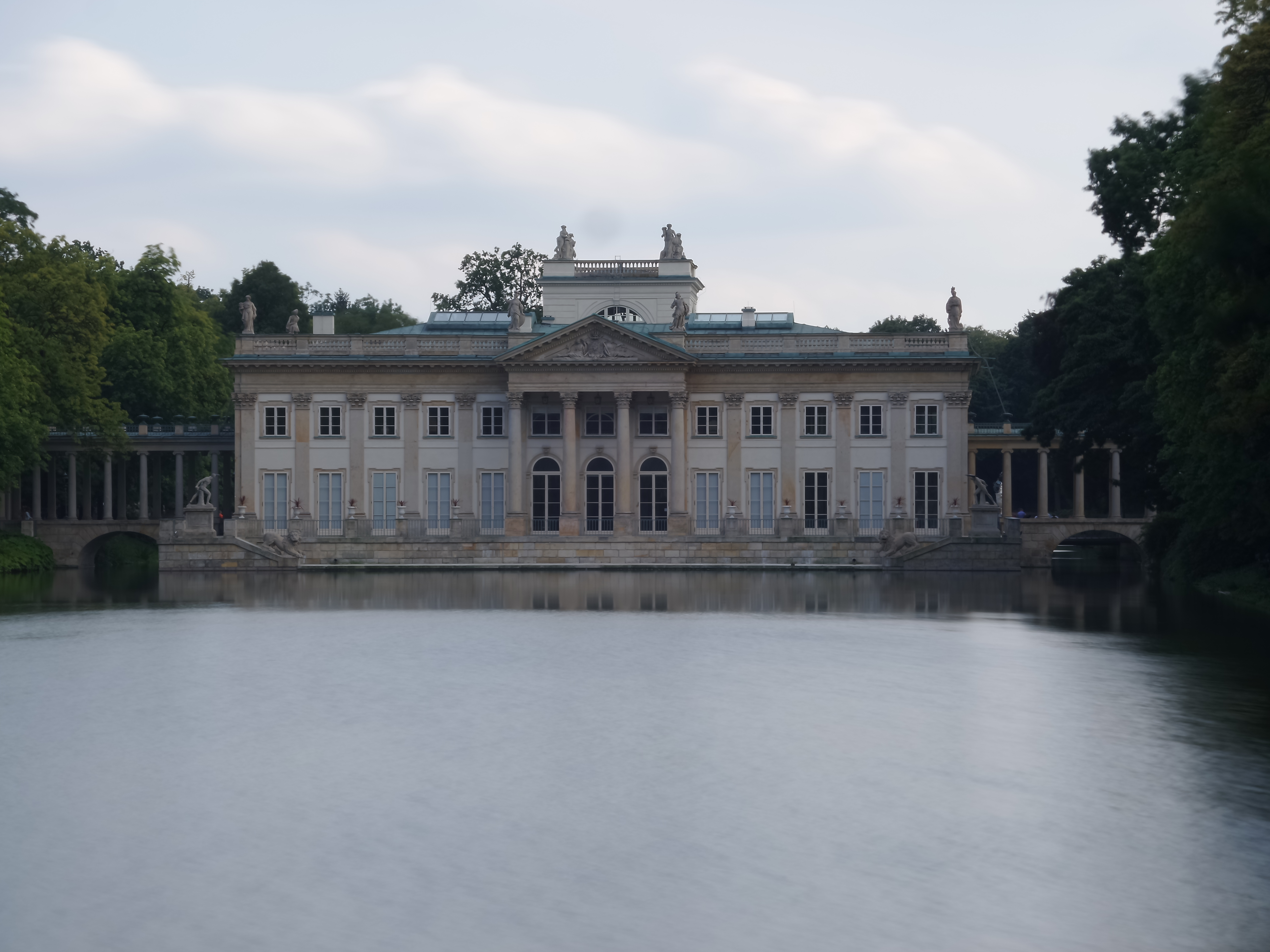 Warszawa, zespół pałacowo-parkowy Łazienki, XVII, XIX